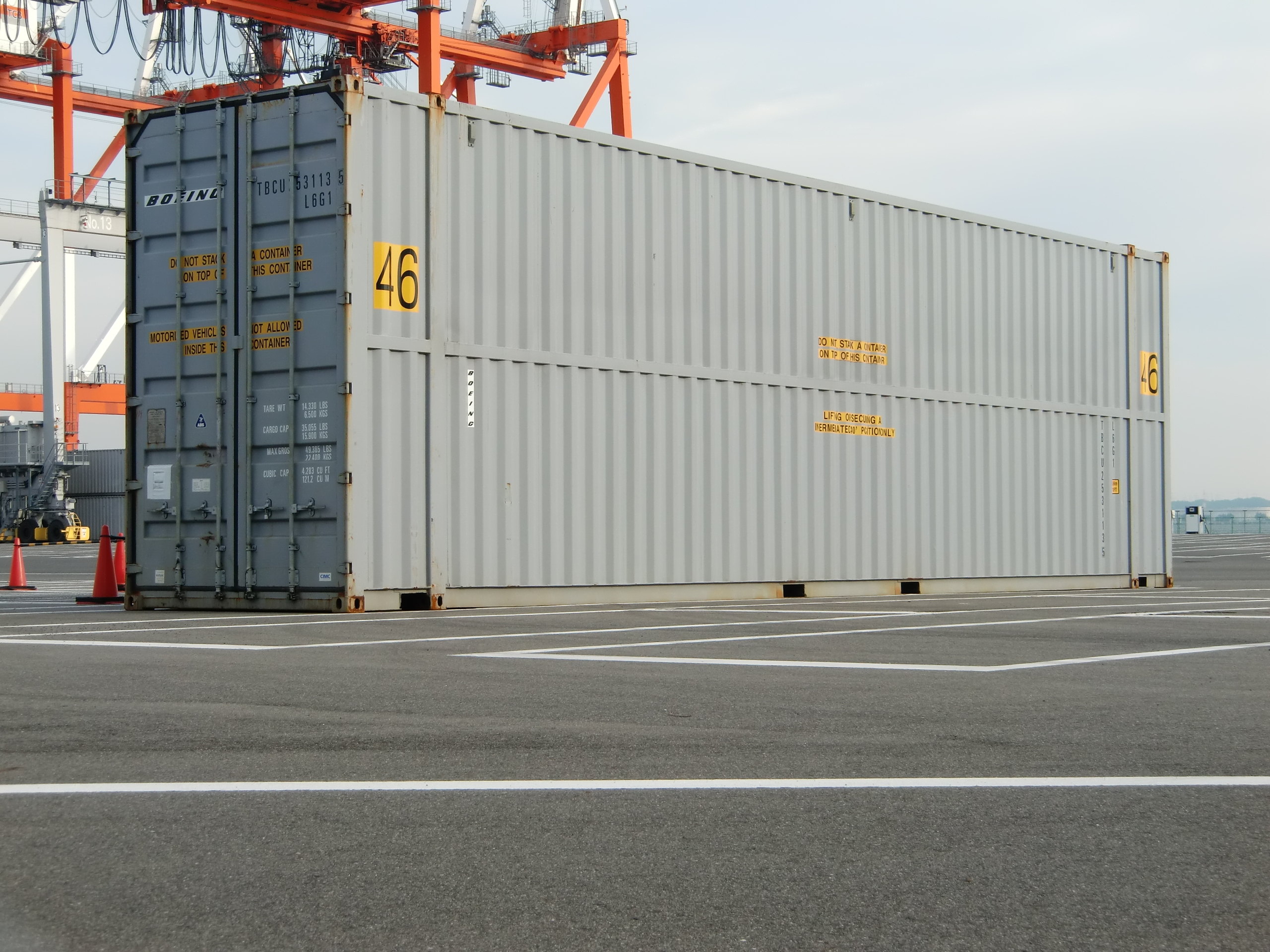 愛知県／飛島埠頭